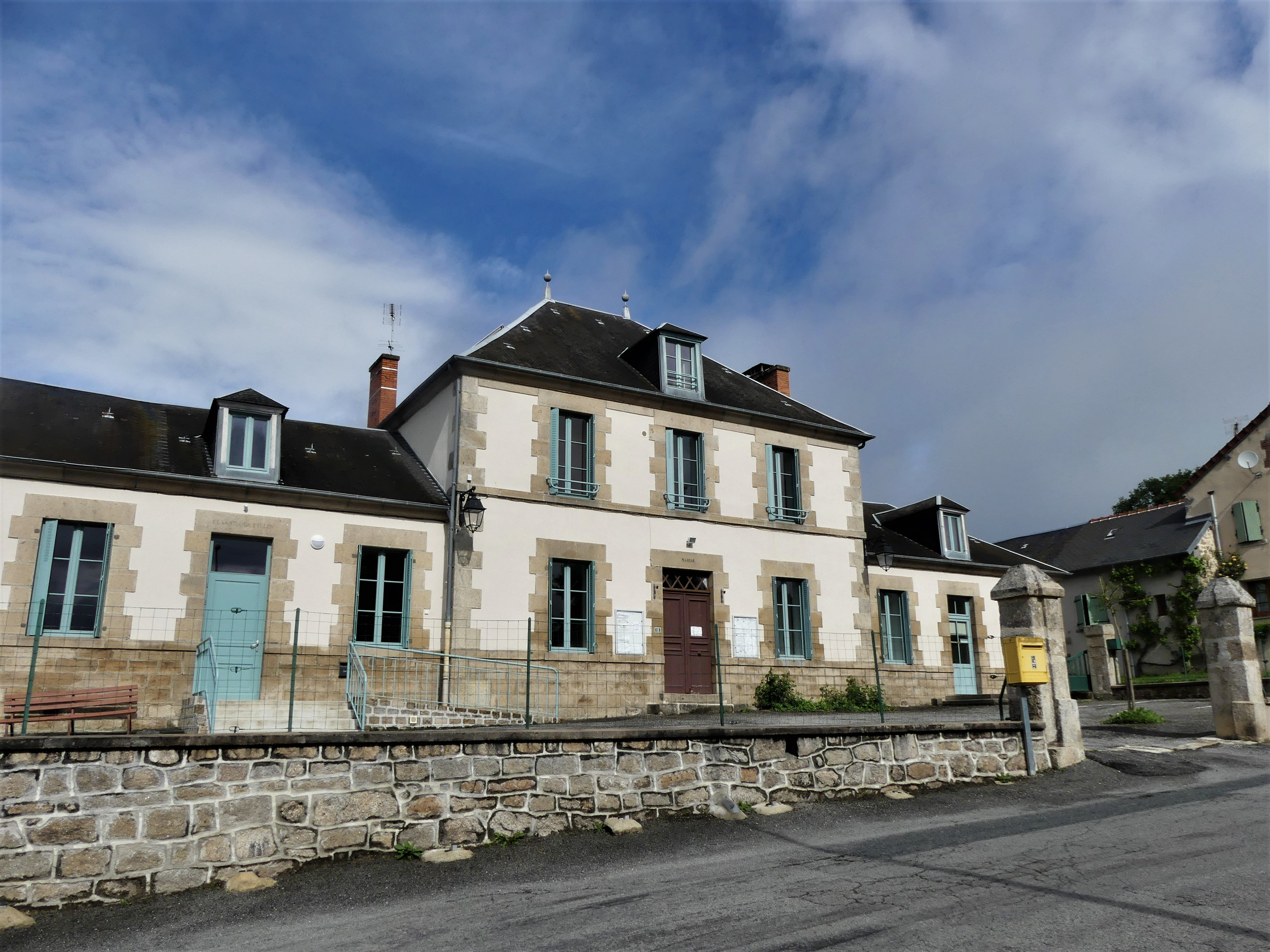 La mairie de Banize, Creuse, France.